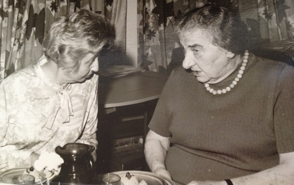 תמר אשל בשיחה עם גולדה מאיר כיו"ר נעמת